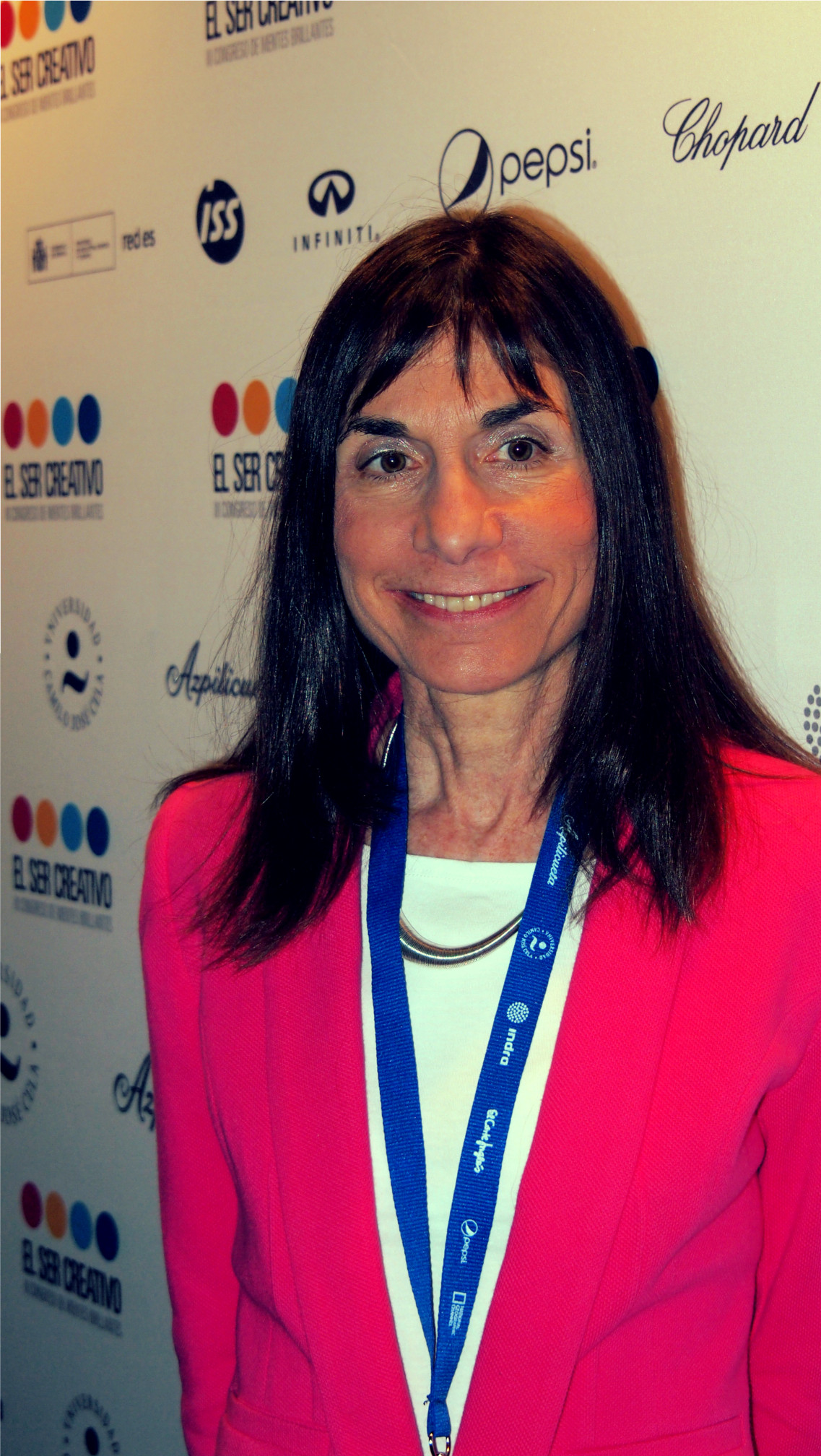 Psychologist and geneticist Nancy L. Segal in "El Ser Creativo" conference in Madrid, Spain.